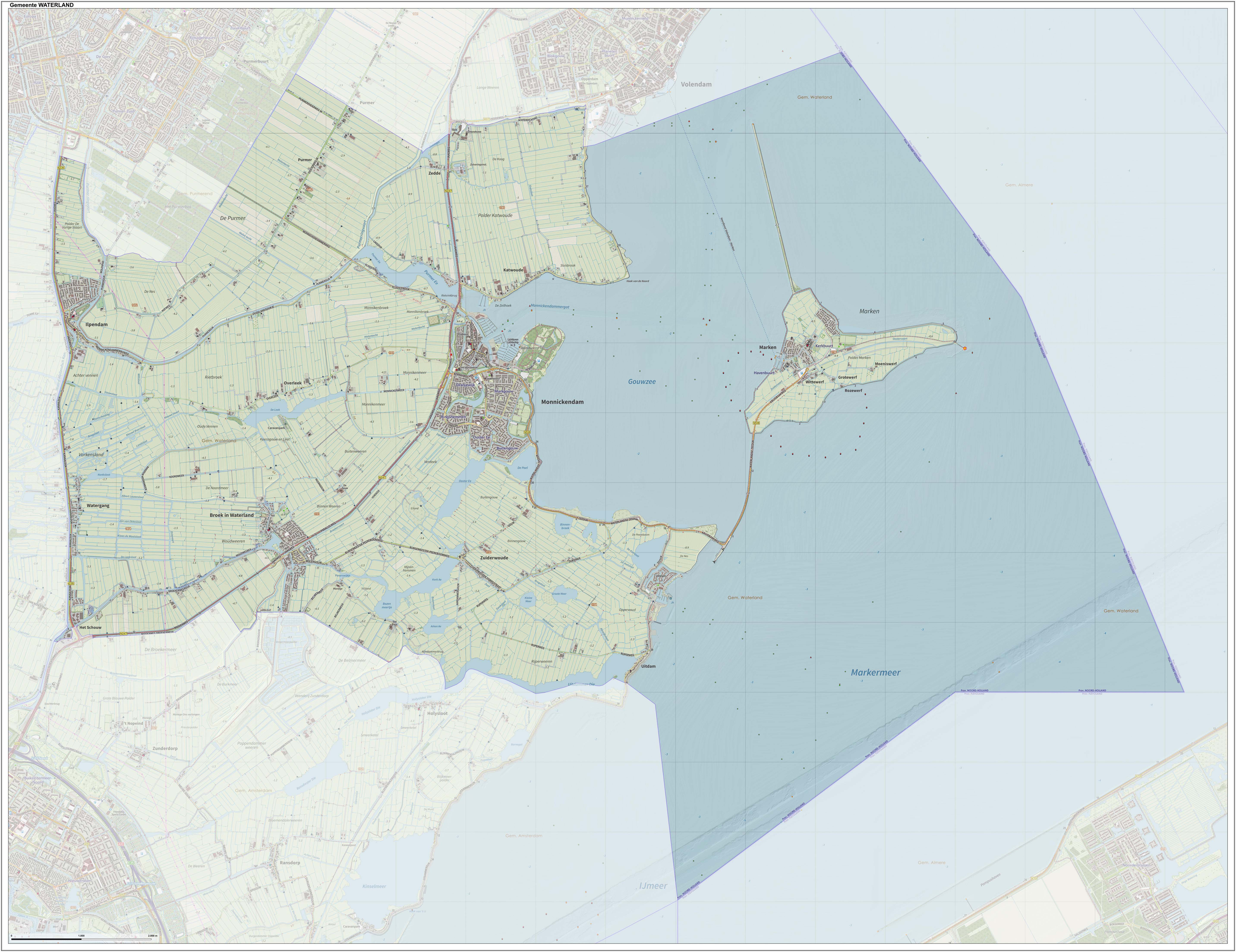 Topografische gemeentekaart. Resolutie: 400 pixels/km. Kaartbeeld samengesteld uit de open geodata van de Top10NL en Top25namen (Kadaster), Creative Commons-BY licentie. Gebouwvlakken uit open geodata BAG extract. Wegen uit de OpenStreetMap, OpenStreetMap community. Reliëfschaduw uit de Actuele Hoogtekaart AHN2. Samenstelling en kleurenschema: Jan-Willem van Aalst, met QGIS. Zie ook de Legenda.